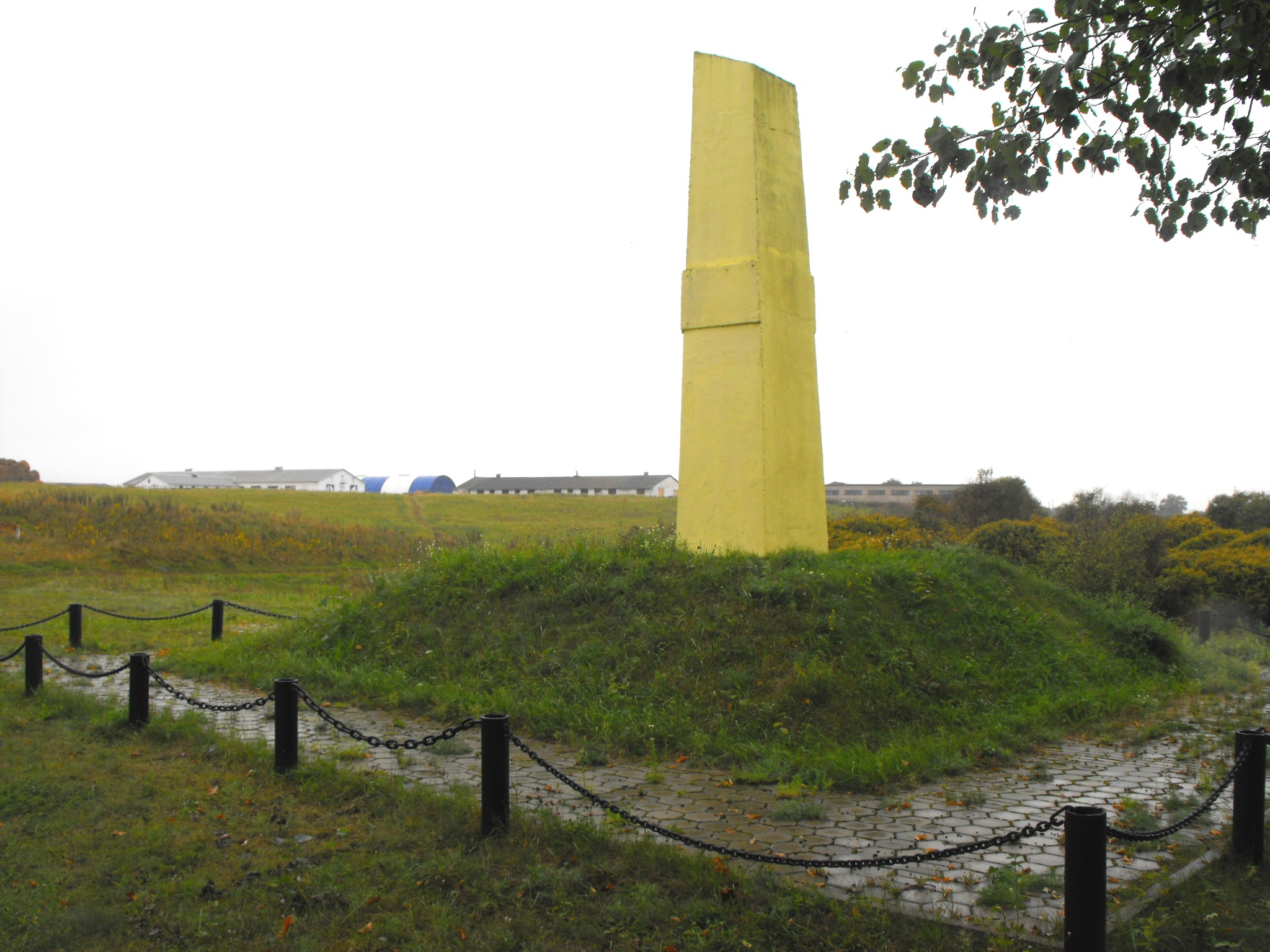 Памятник евреям из гетто в Чашниках, убитых нацистами и коллаборационистами. Установлен в деревне Заречная Слобода (Чашникский район, Витебская область).